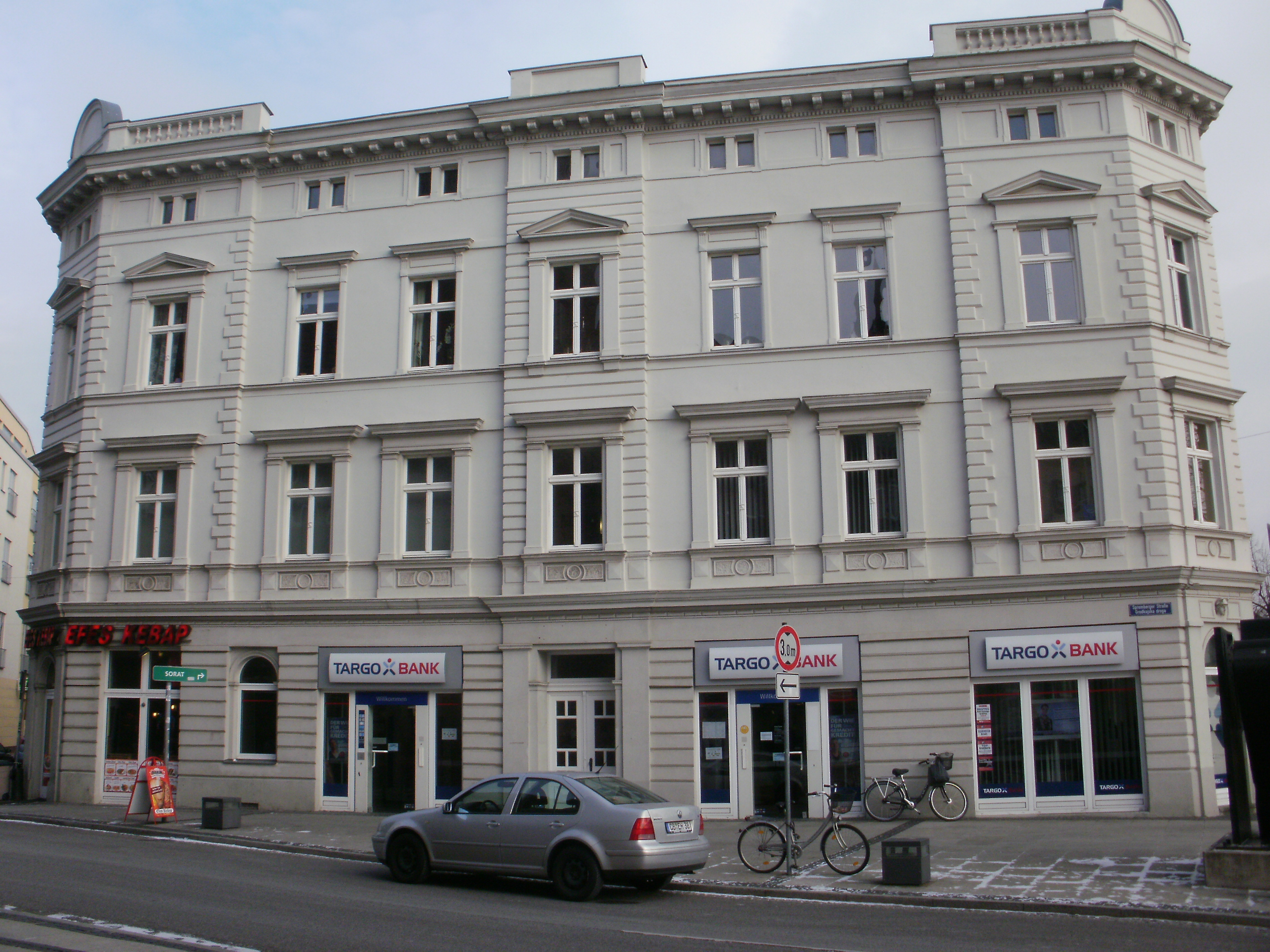 Mietwohn- und Geschäftshaus Spremberger Straße 17, Cottbus